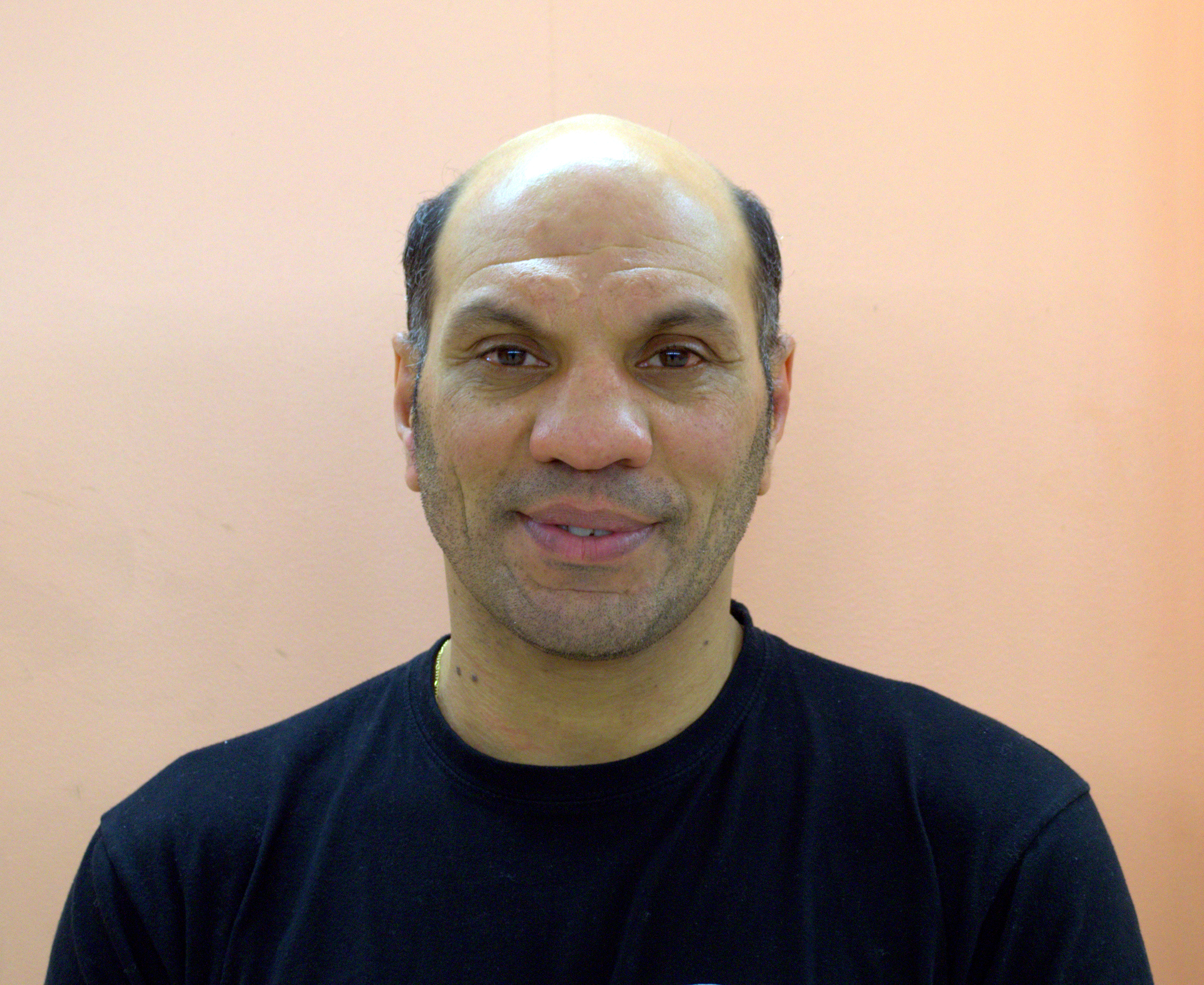 Le boxeur Hacine Cherifi en 2014, dans la salle de boxe "Marcel Cerdan - Hacine Cherifi" de Montluel où il est entraîneur.